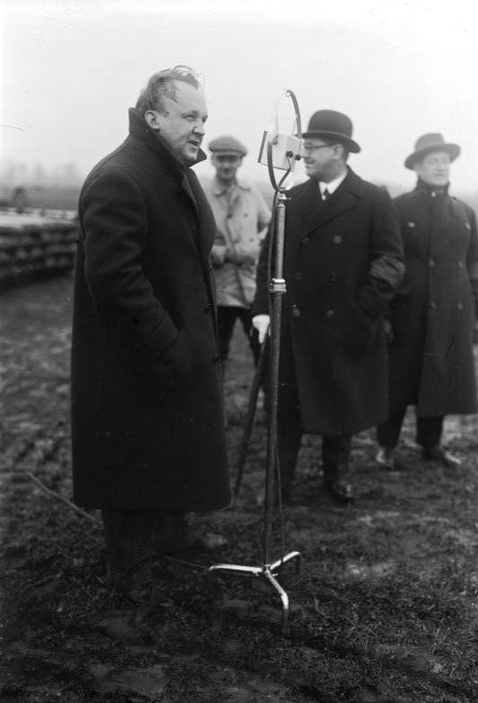 Der jubelnde Empfang des Luftschiffes "Graf Zeppelin" in der Reichshauptstadt Berlin! Der bekannte Rundfunkansager Alfred Braun, welcher die Zeppelinempfangsfeierlichkeiten in Berlin durch den Rundfunk mitteilte.